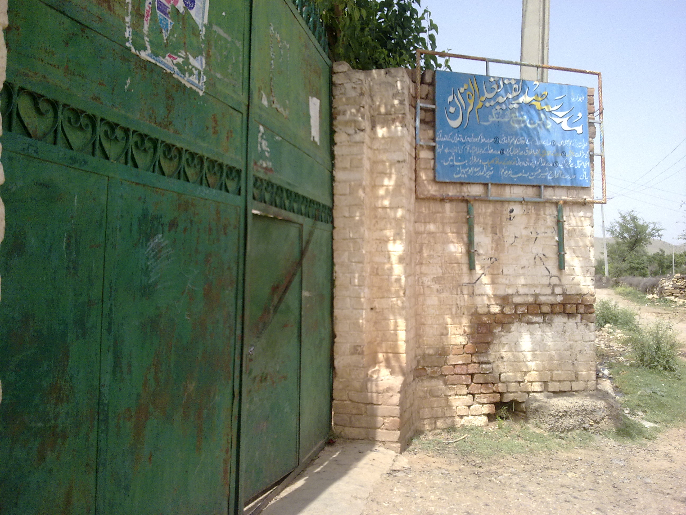 Dallan Madrassa , Khyber Pakhtunkhwa , Pakistan